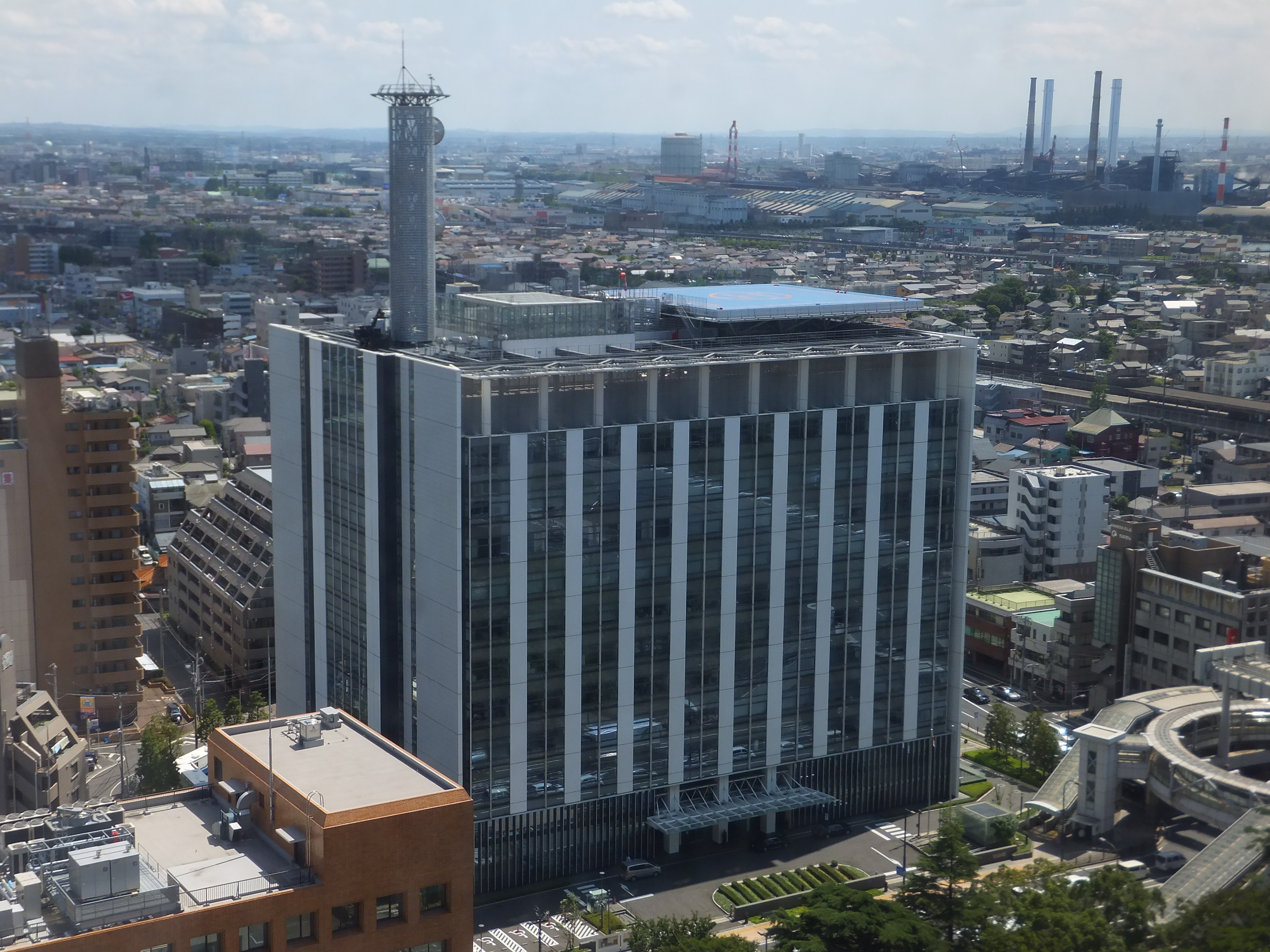 千葉県庁本庁舎から見た千葉県警察本部